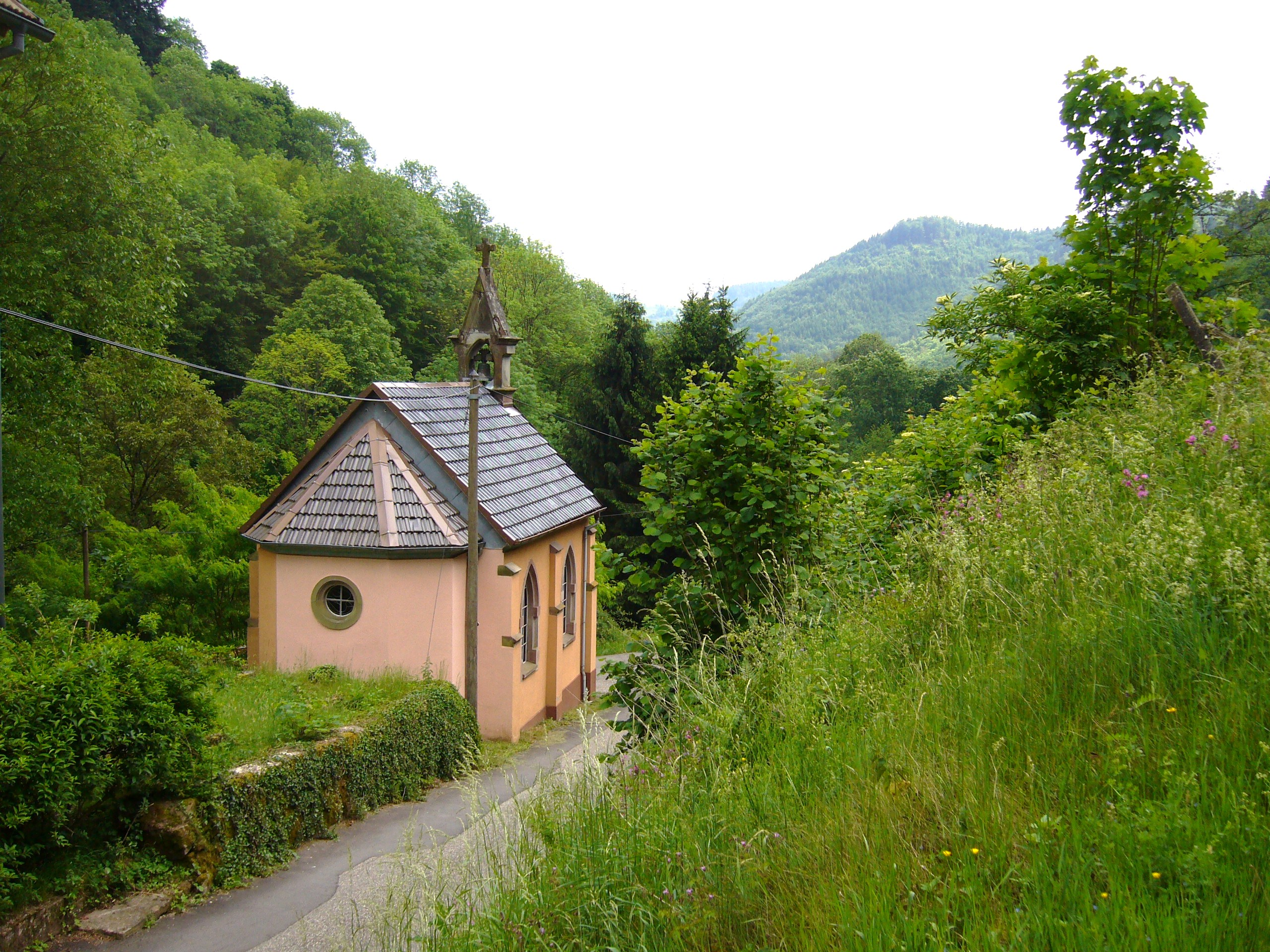 La Hingrie 011.JPG